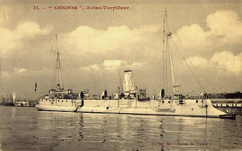 Aviso-torpilleur français Condor (classe Condor)